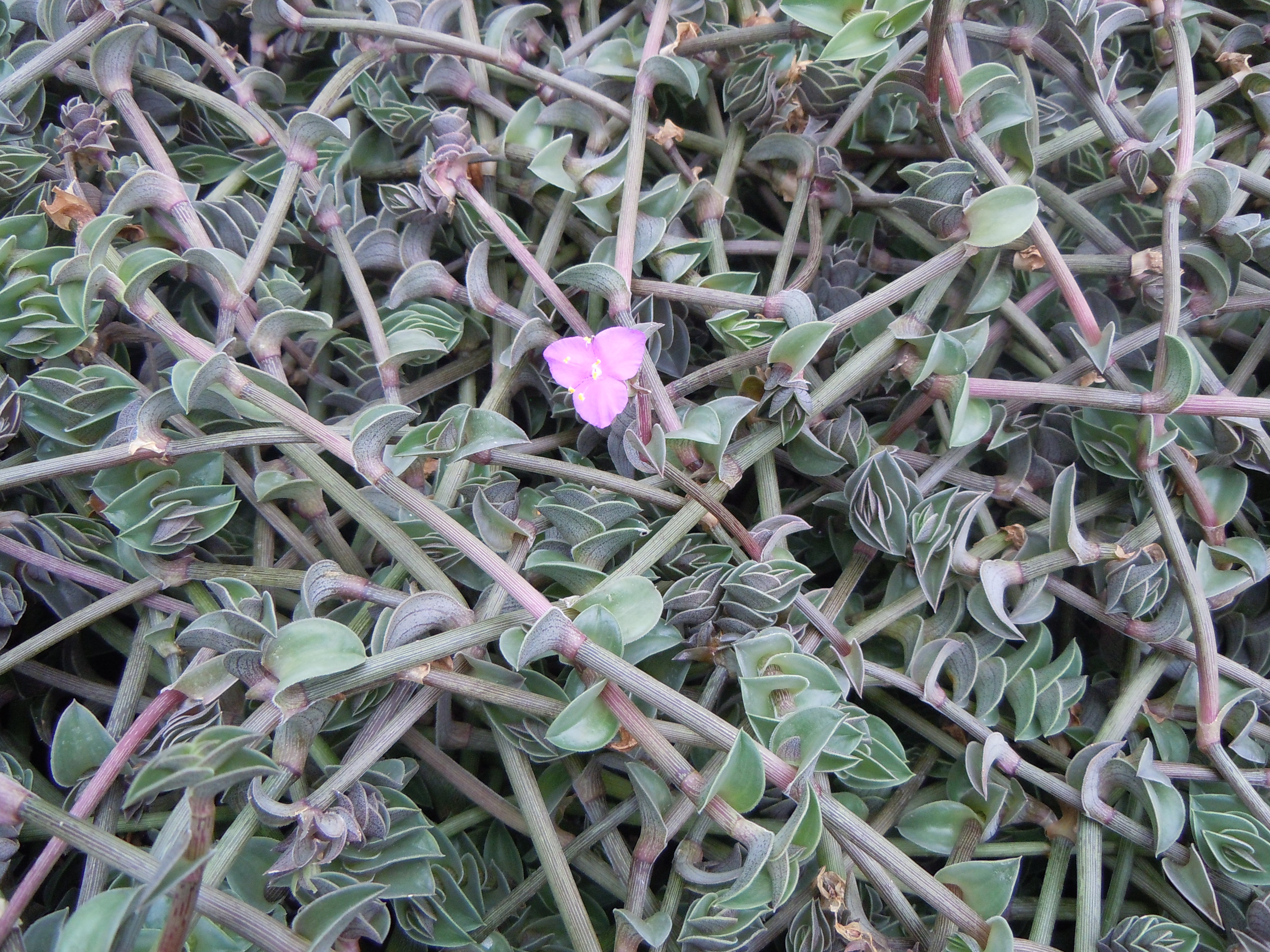 Callisia navicularis - Serres d'Auteuil